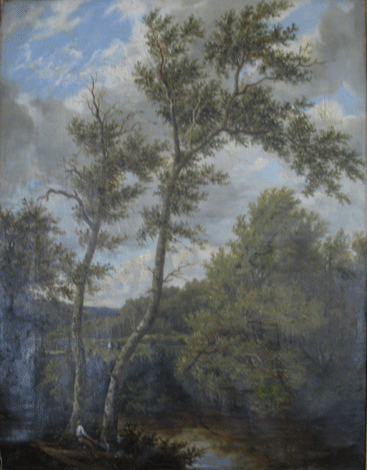 Paysage animé. Collection privée. Fichier scanné par Bruno Van Eeckhout, tiré d'une photographie originale provenant du patrimoine de la famille Van Eeckhout.